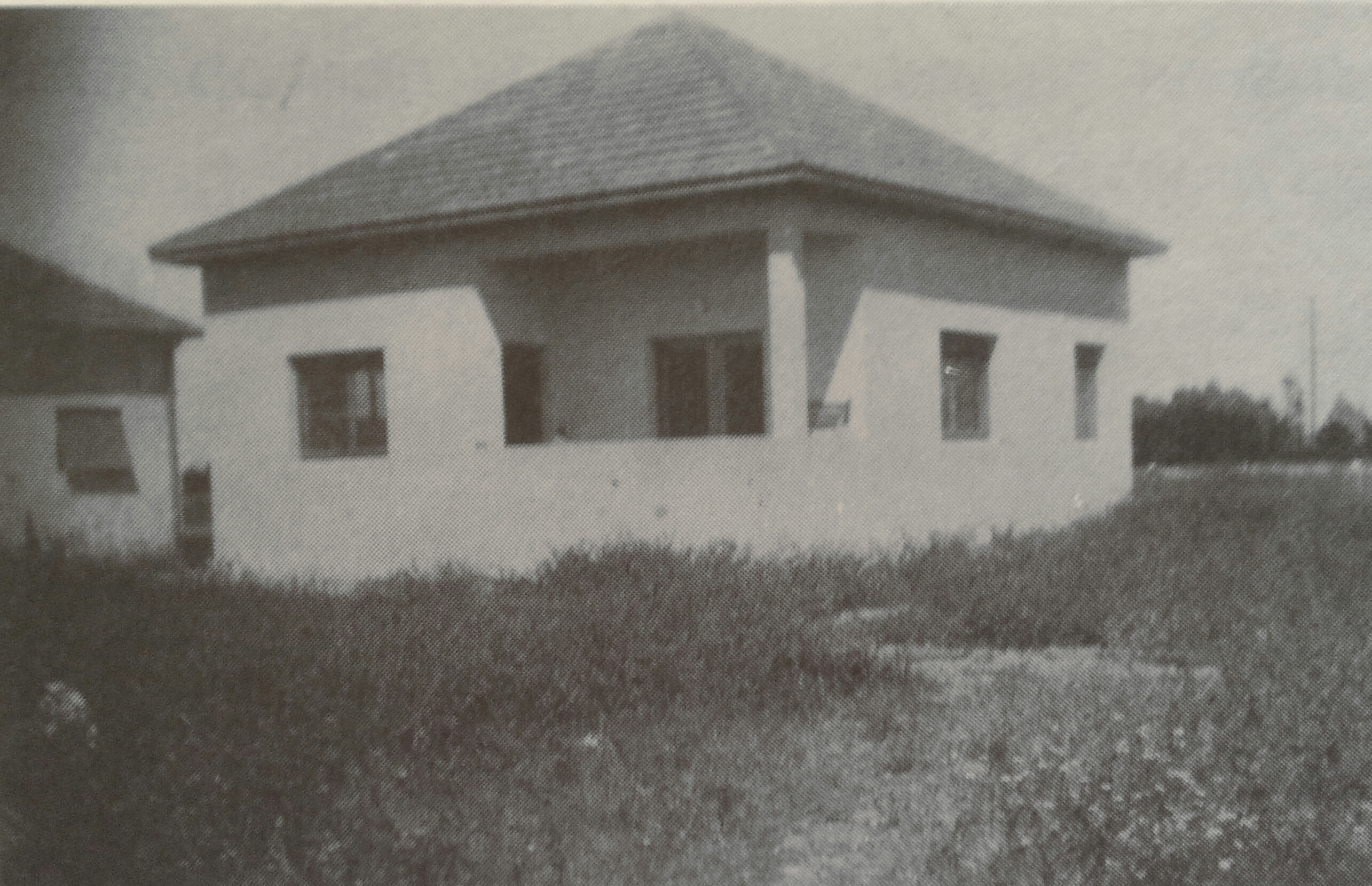 בית פרומר בקריית שמואל, שנות ה-40 (?). הבית שנבנה ברחוב בר אילן של ימינו היה אחד מ-13 הבתים הראשונים שעלו לקרקע ב-1938